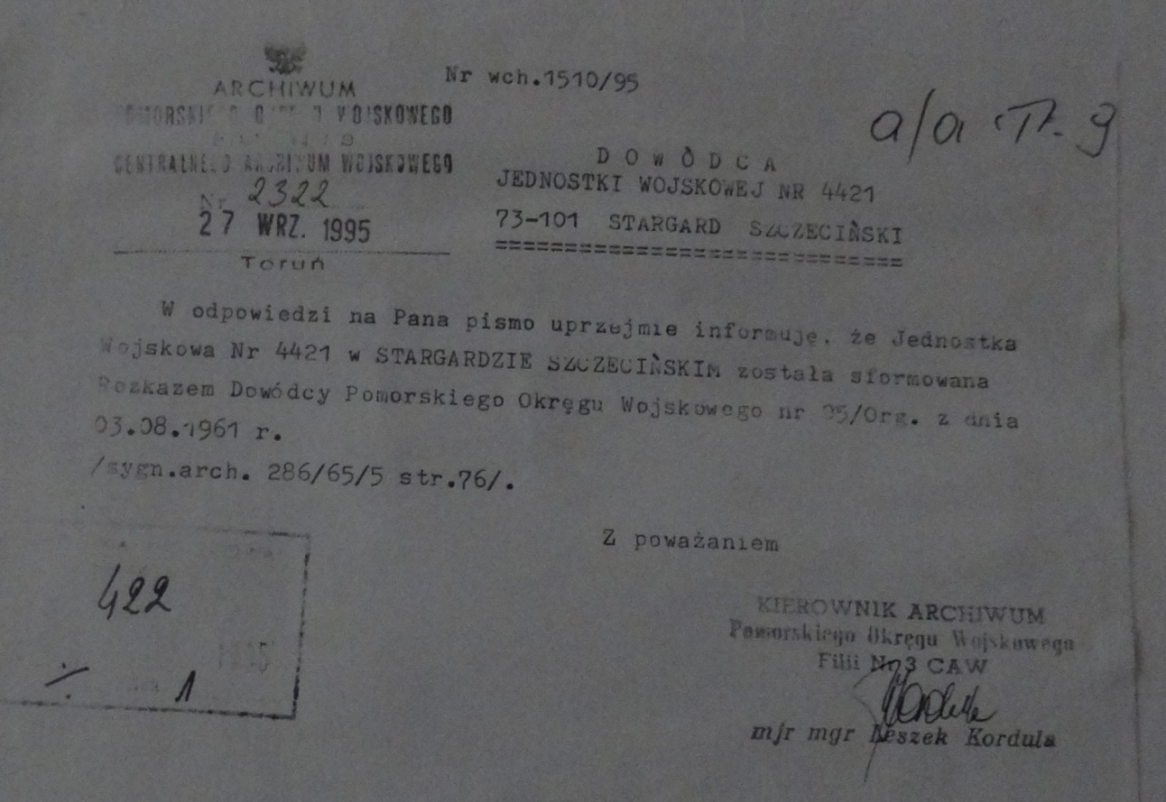 Dokument POW - Powstanie 45 Batalionu Medyczno-Sanitarnego